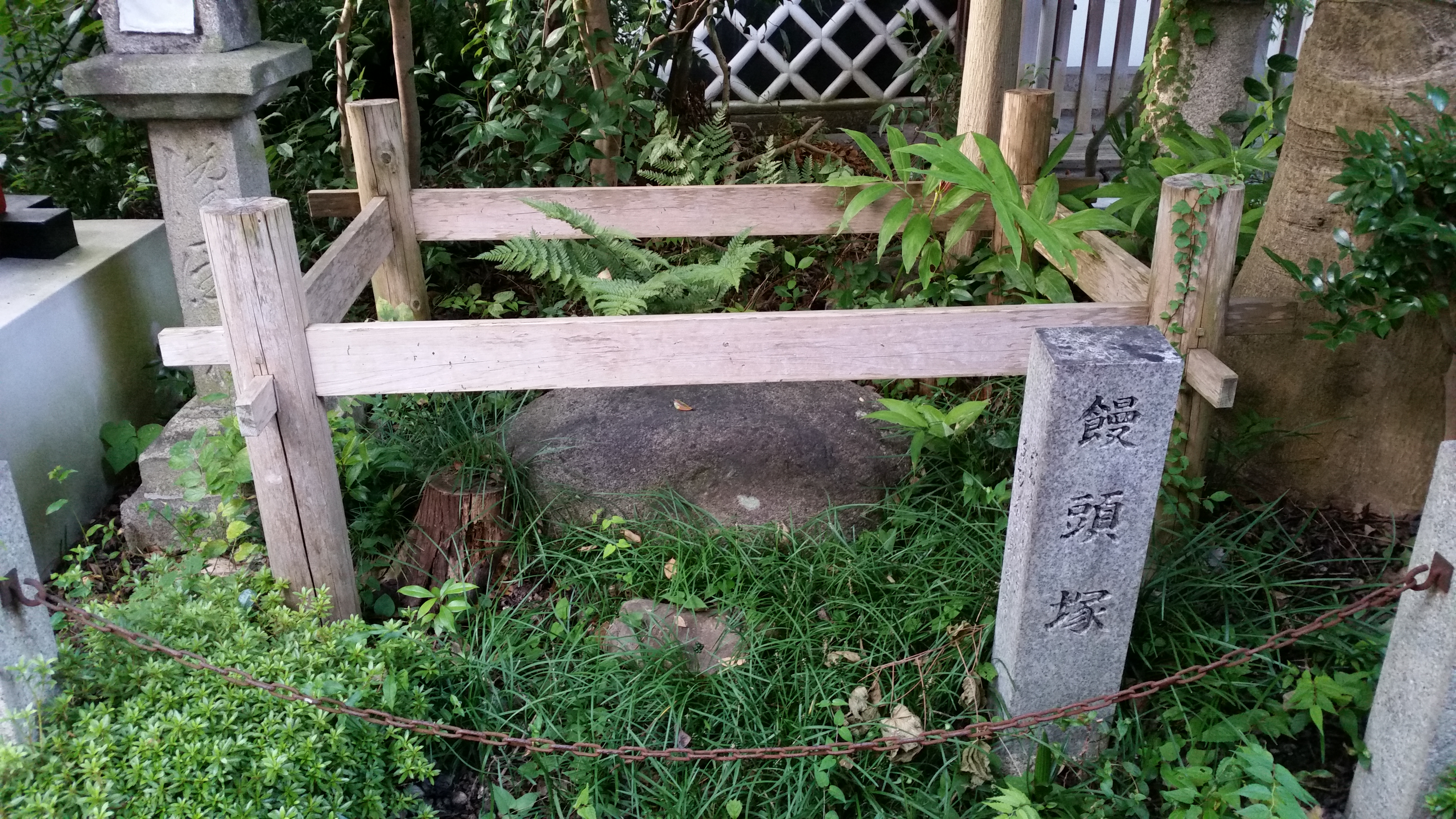 漢國神社 饅頭石、奈良